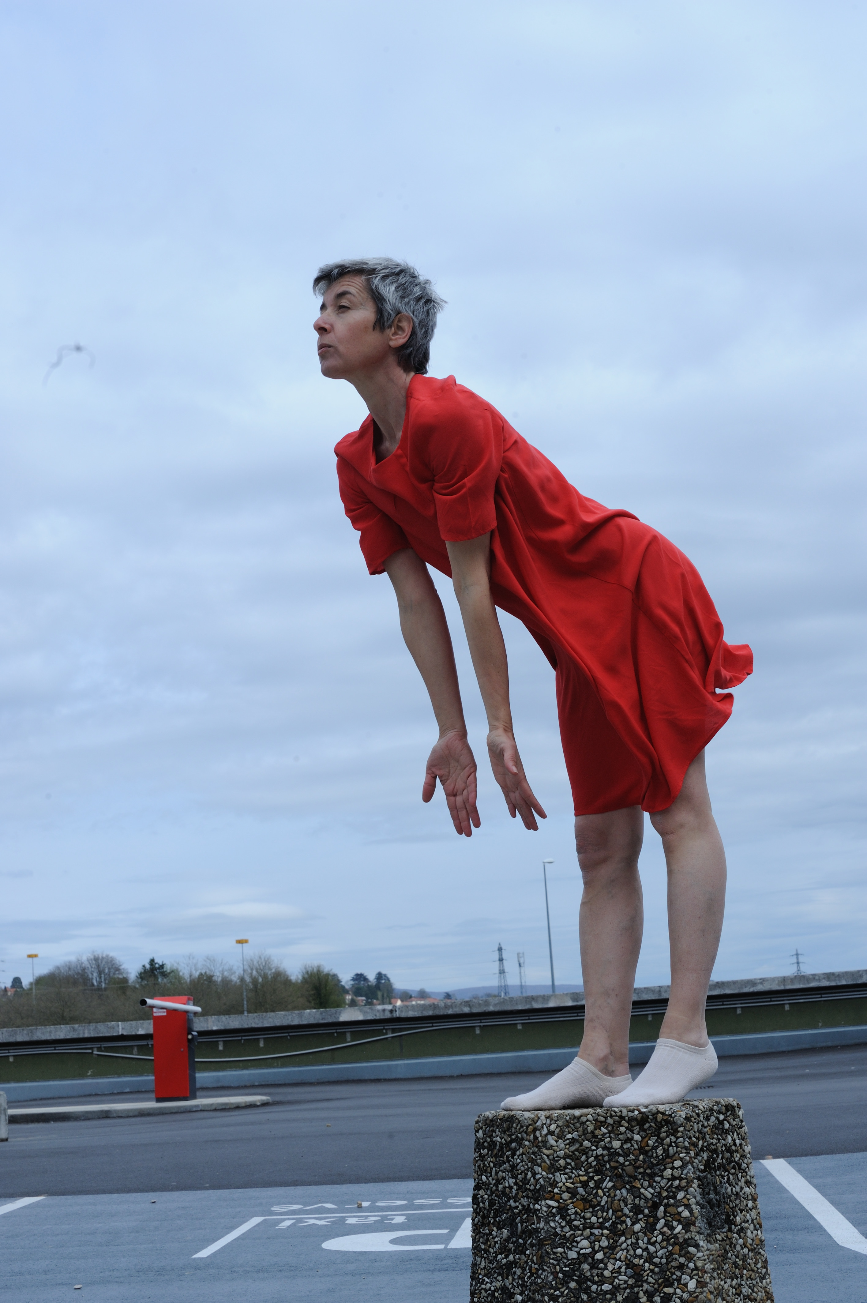 Geneviève Pernin. Danse sur un plot, robe rouge.